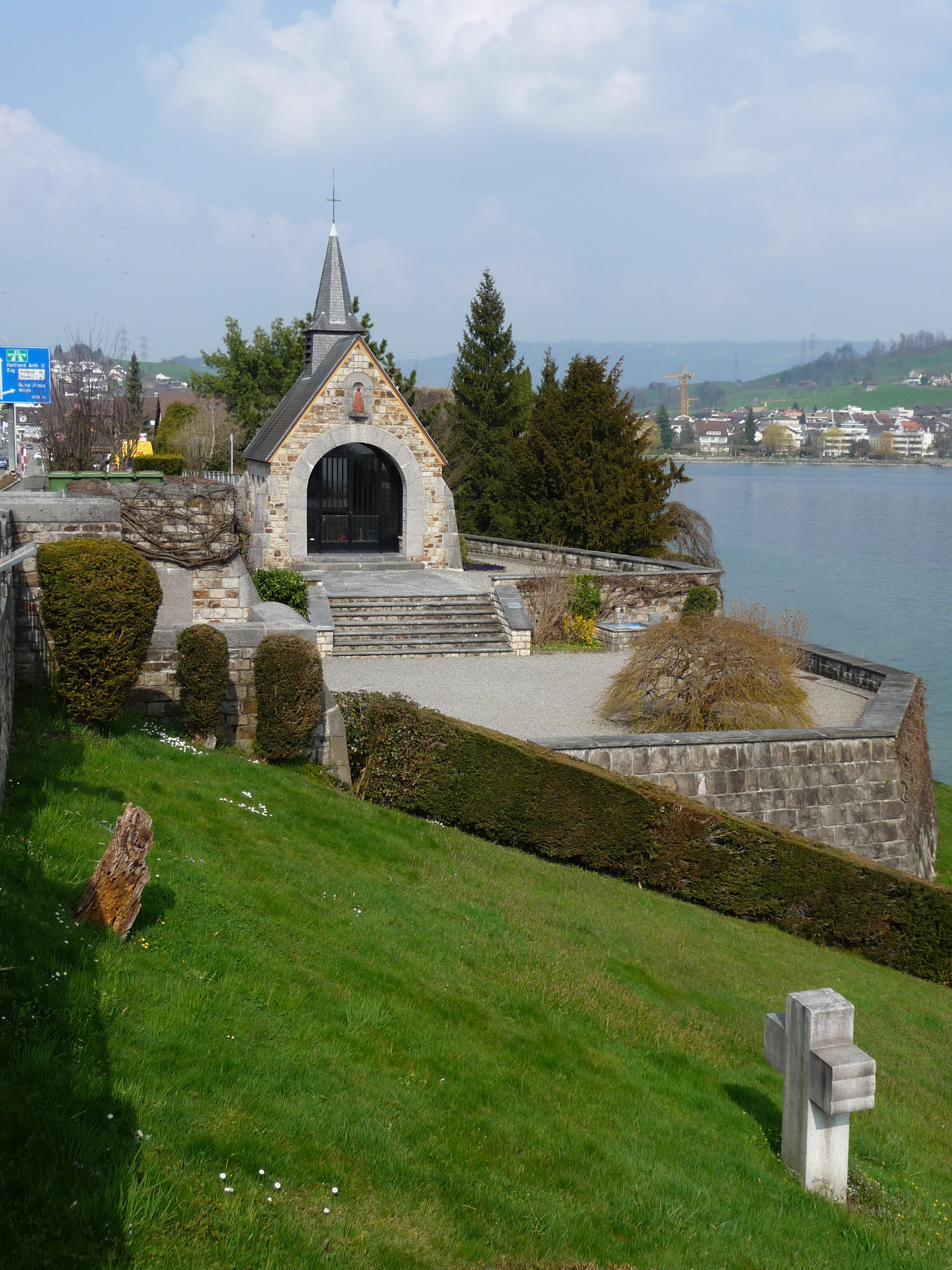 Astrid-Kapelle in Küssnacht am Rigi (Schweiz)